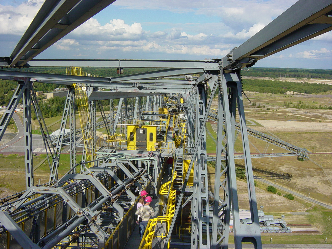 Innenansicht des Tragwerks einer F60 am Besucherbergwerk F60